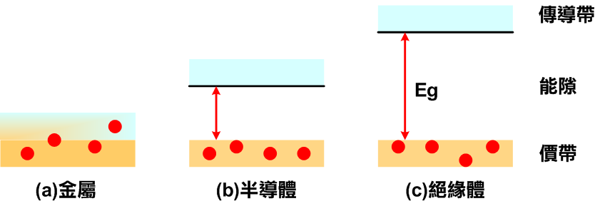 三種材料的能隙比較